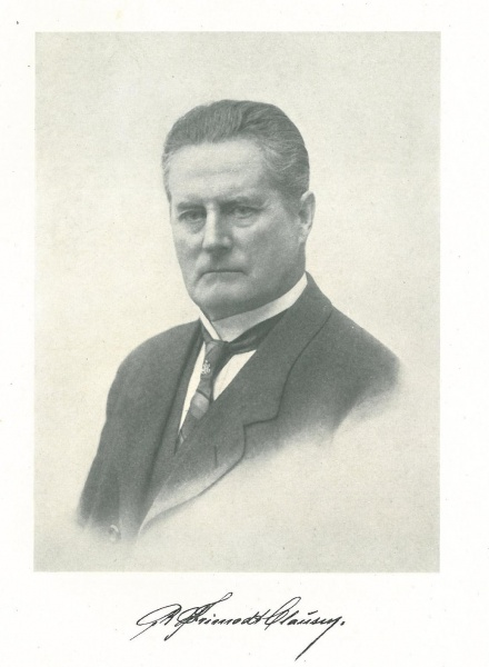 Rudolf Frimodt Clausen (1861-1950), dansk arkitekt